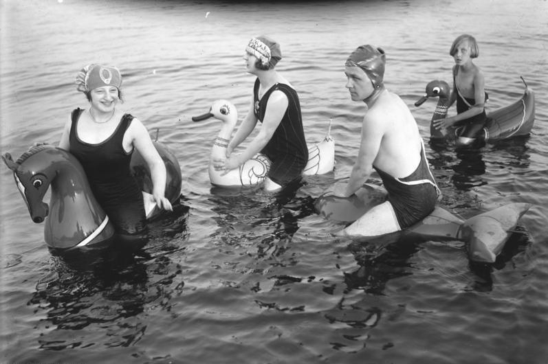 Lustiger Wassersport! Wasserreiten auf Gummitieren, ein lustiger Sport auf unseren märkischen Gewässern.